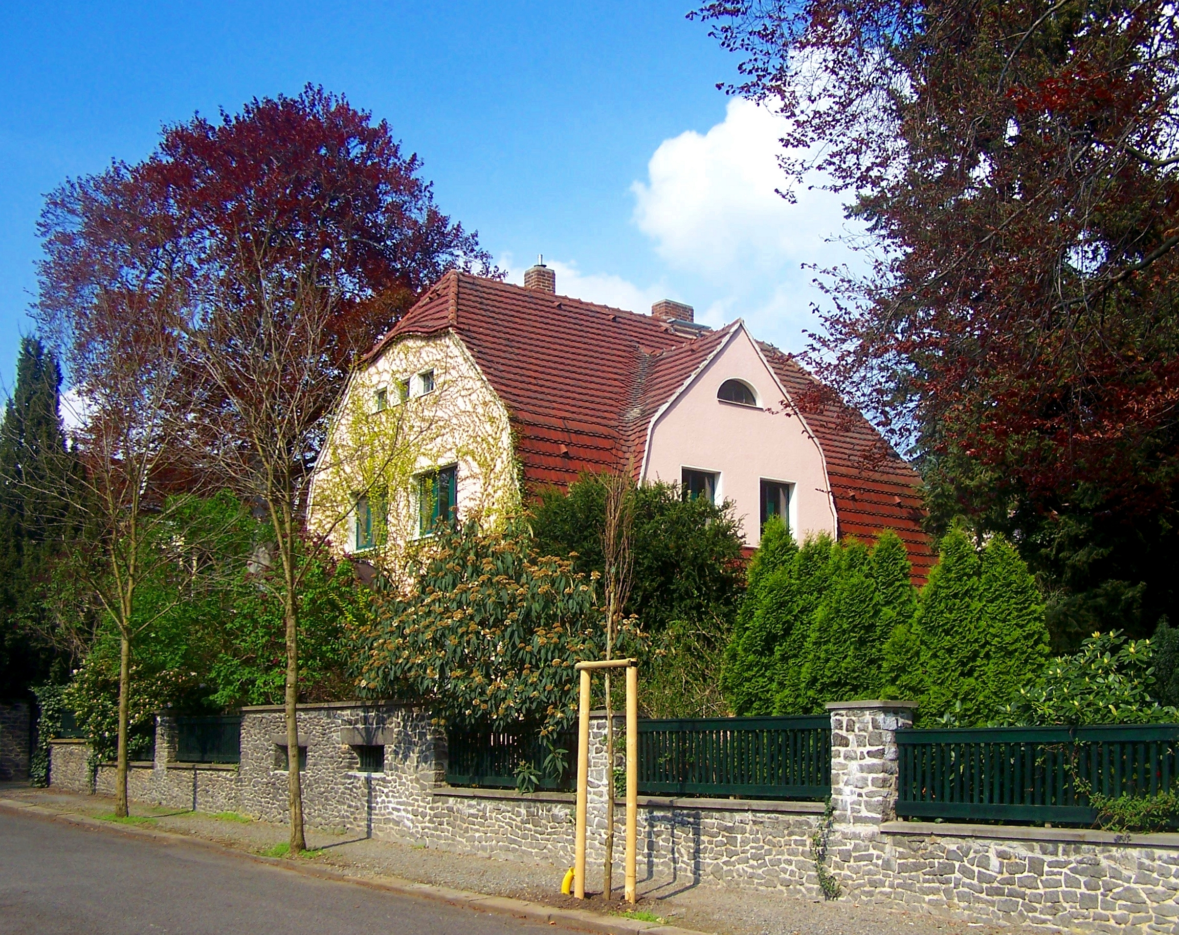 Landhaus Arno Faber, Freiligrathstr. 6 in Radebeul